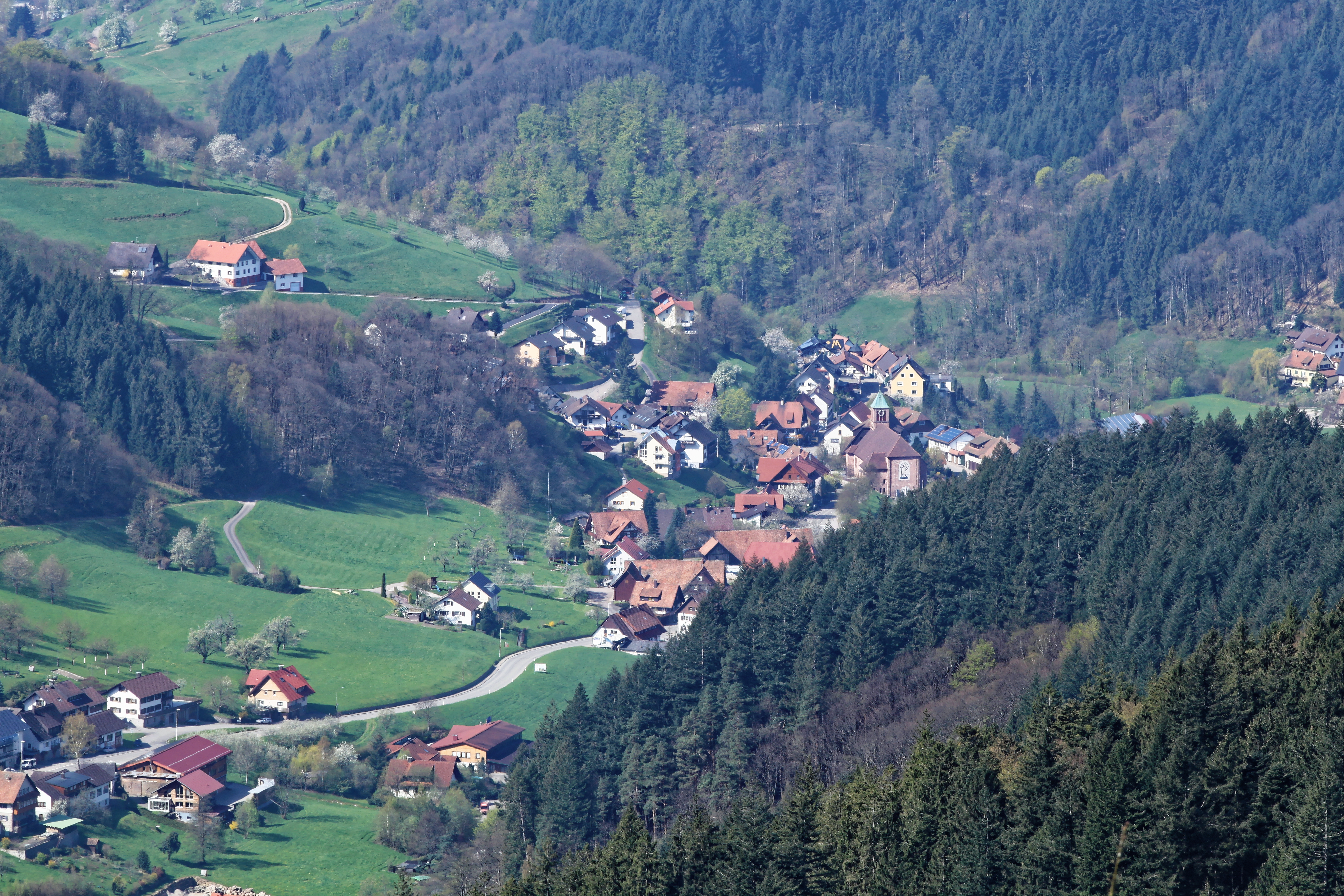 Blick von der Schwarzwaldhochstraße in Seebach (Baden) hinunter auf Seebach (Baden)